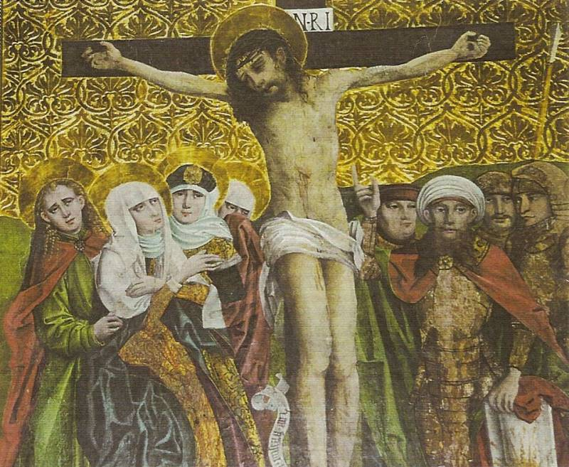 Marcin Czarny, Ukrzyżowanie , kosciół w Uniejowie